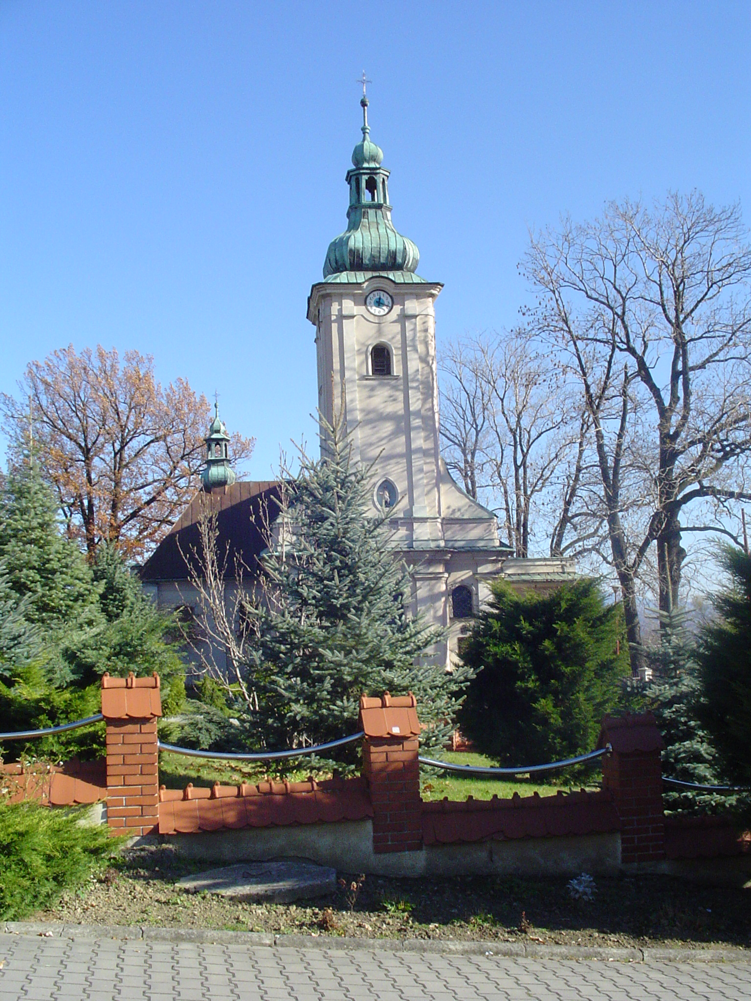 Kościół Św. Marcina w Radziechowach